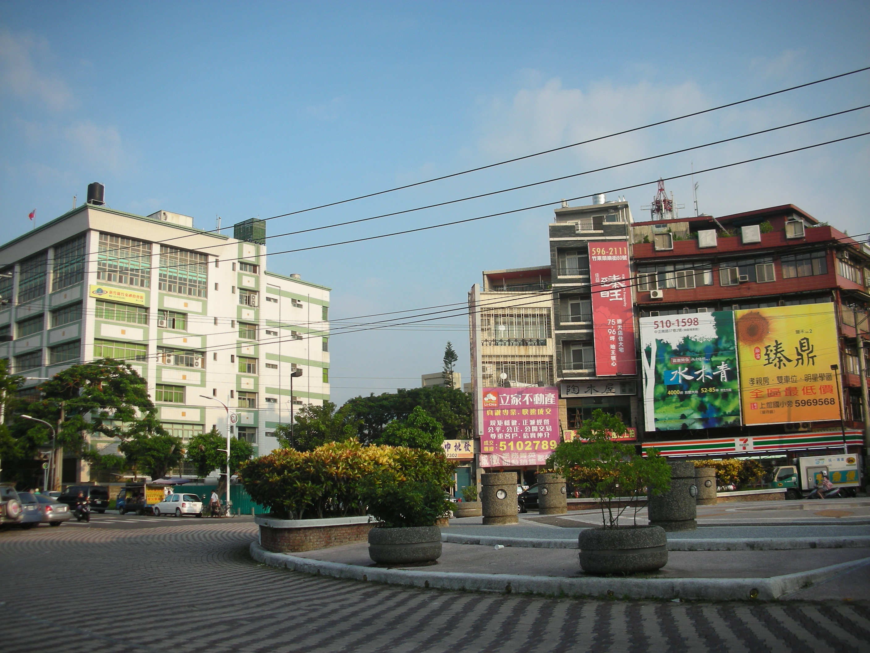 竹東圓環街景 Zhudong